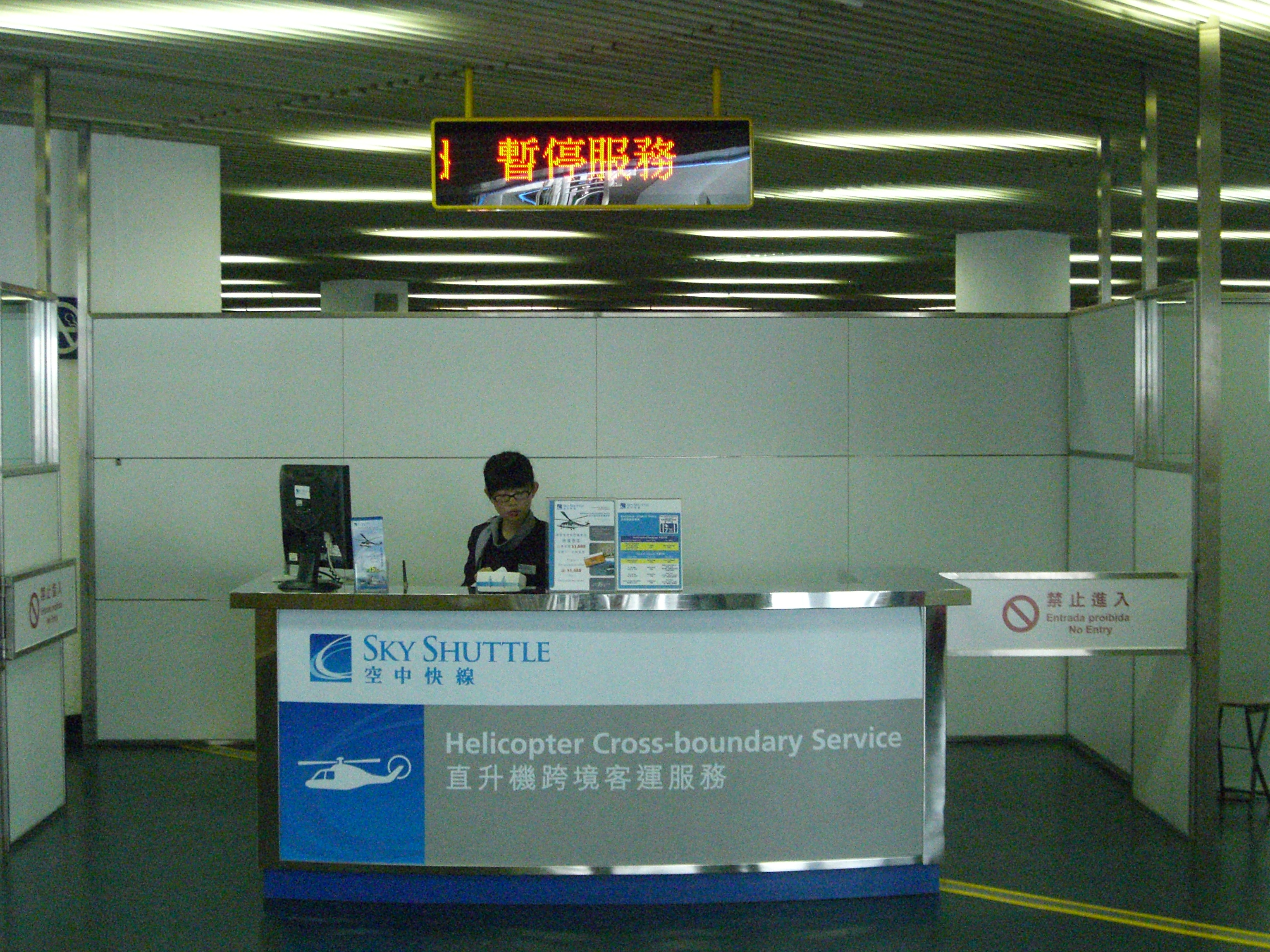 空中快線櫃檯顯示屏出現暫停服務字